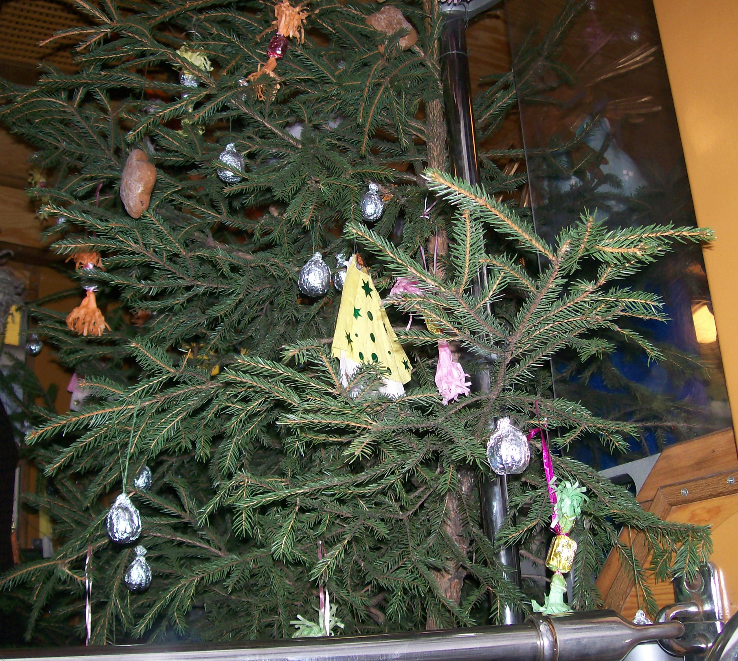 Katowice: "Świąteczna Jazda" z Muzeum Śląskim. Wierzchołek choinki tzw. podłaźniczka.